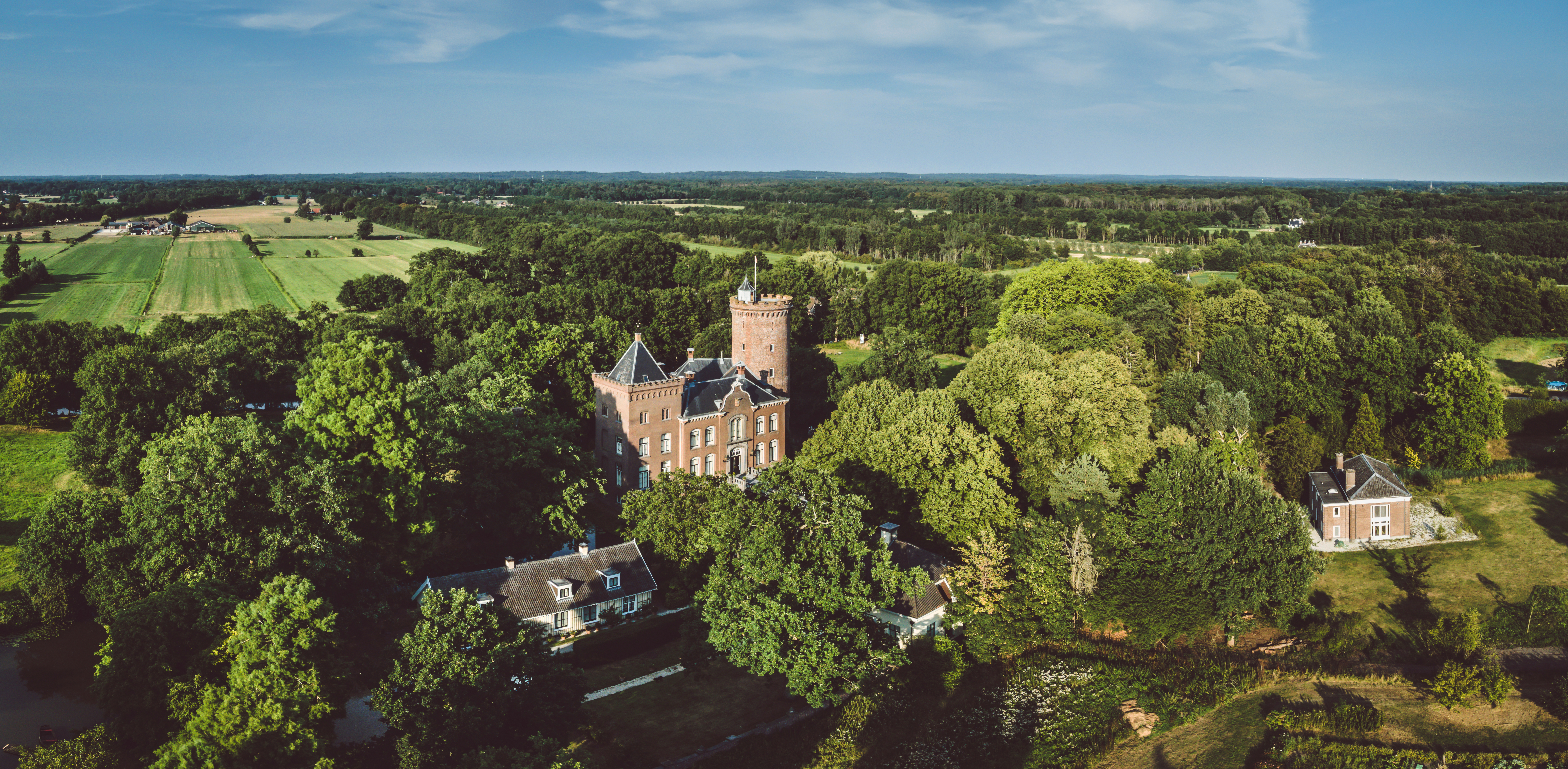 Kasteel Sterkenburg is een ridderhofstad in de voormalige gemeente Sterkenburg bij Driebergen-Rijsenburg, nu deel van de gemeente Utrechtse Heuvelrug in de Nederlandse provincie Utrecht. Foto is gemaakt in de zomer van 2020.